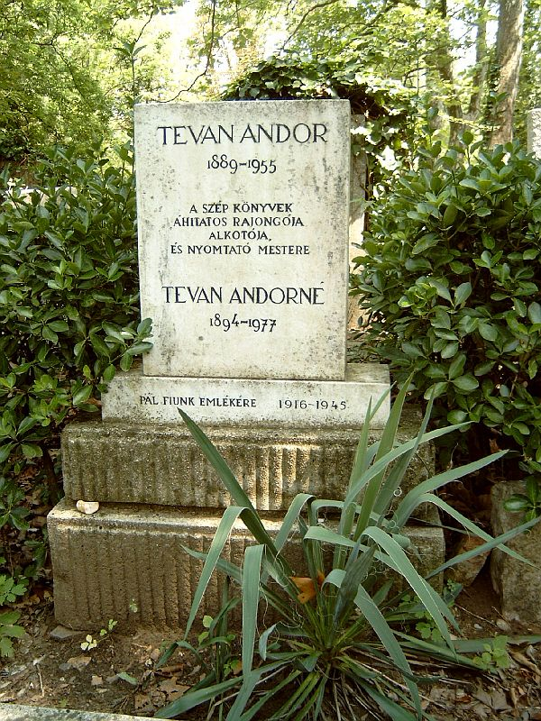 Tevan Andor (Békéscsaba, 1889. aug. 15. – Bp., 1955. okt. 5.) könyvkiadó és könyvnyomda-tulajdonos sírja Budapesten. Kozma utcai zsidó temető: 17A/1-10-1.